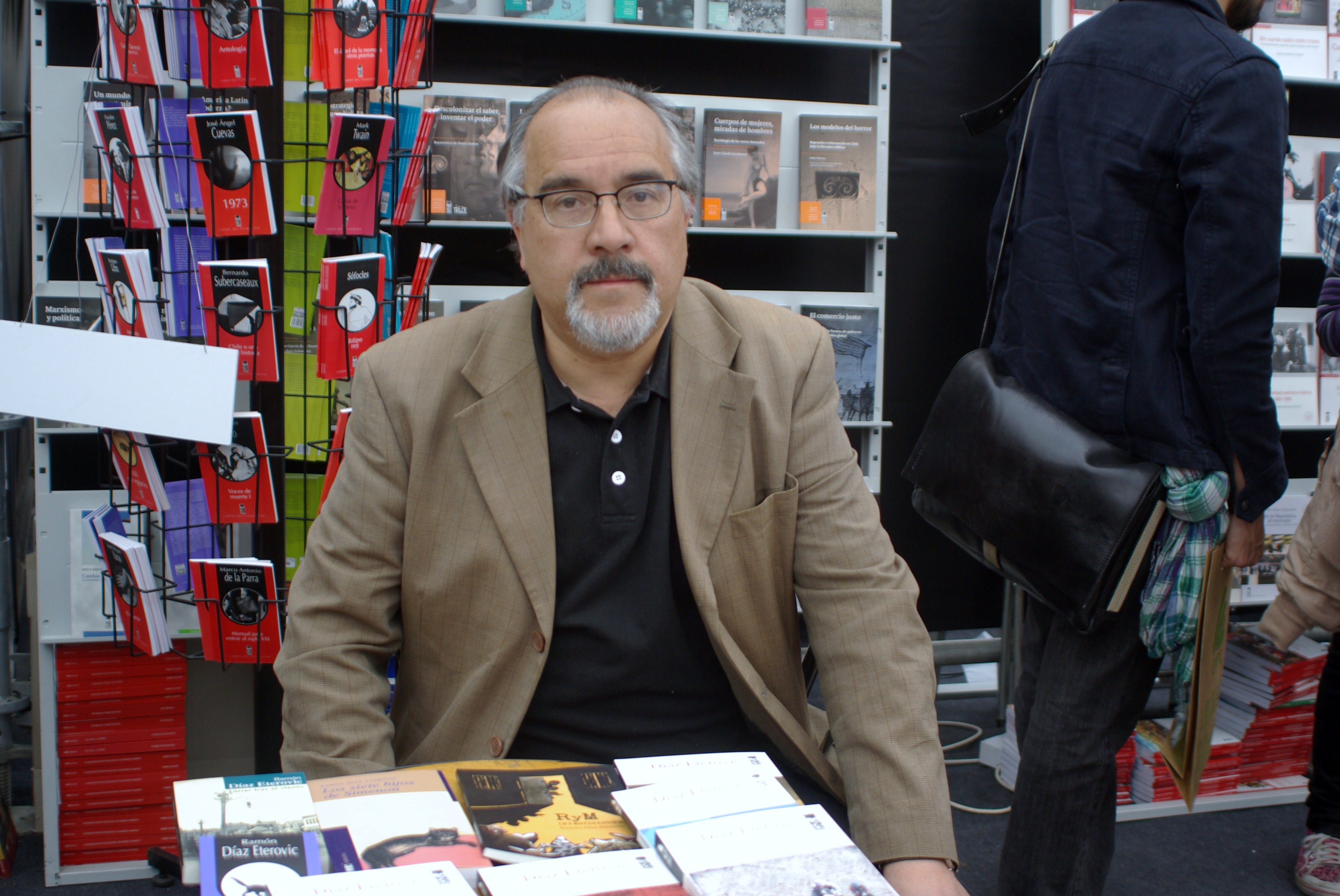 El escritor chileno Ramón Díaz Eterovic en la Feria Internacional del Libro de Santiago 2015